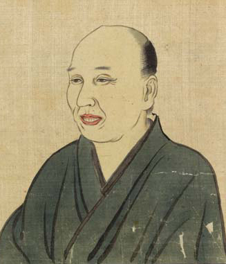 黒田綾山肖像『近世名家肖像』より